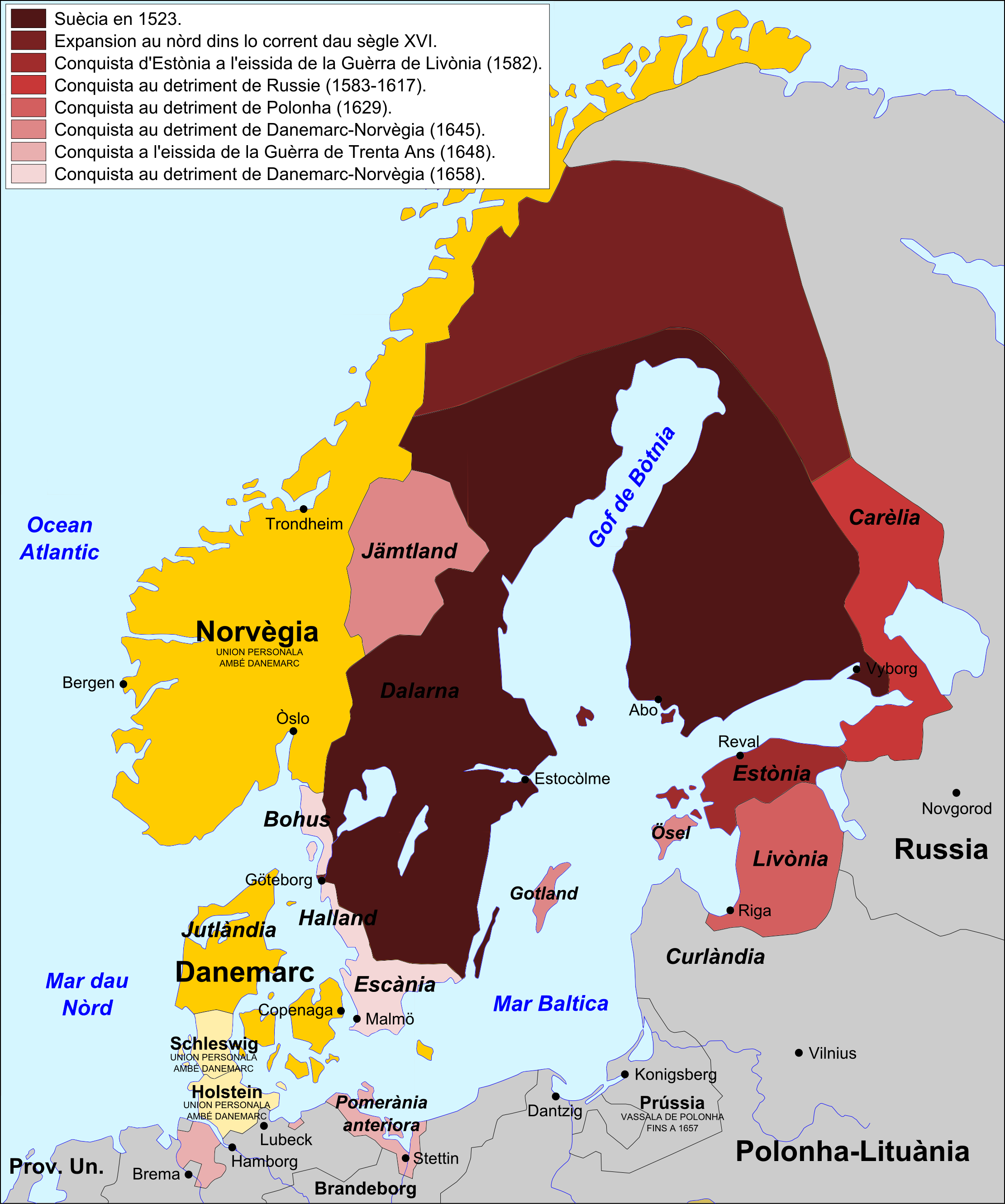 Expansion suedesa ai sègles XVI e XVII.